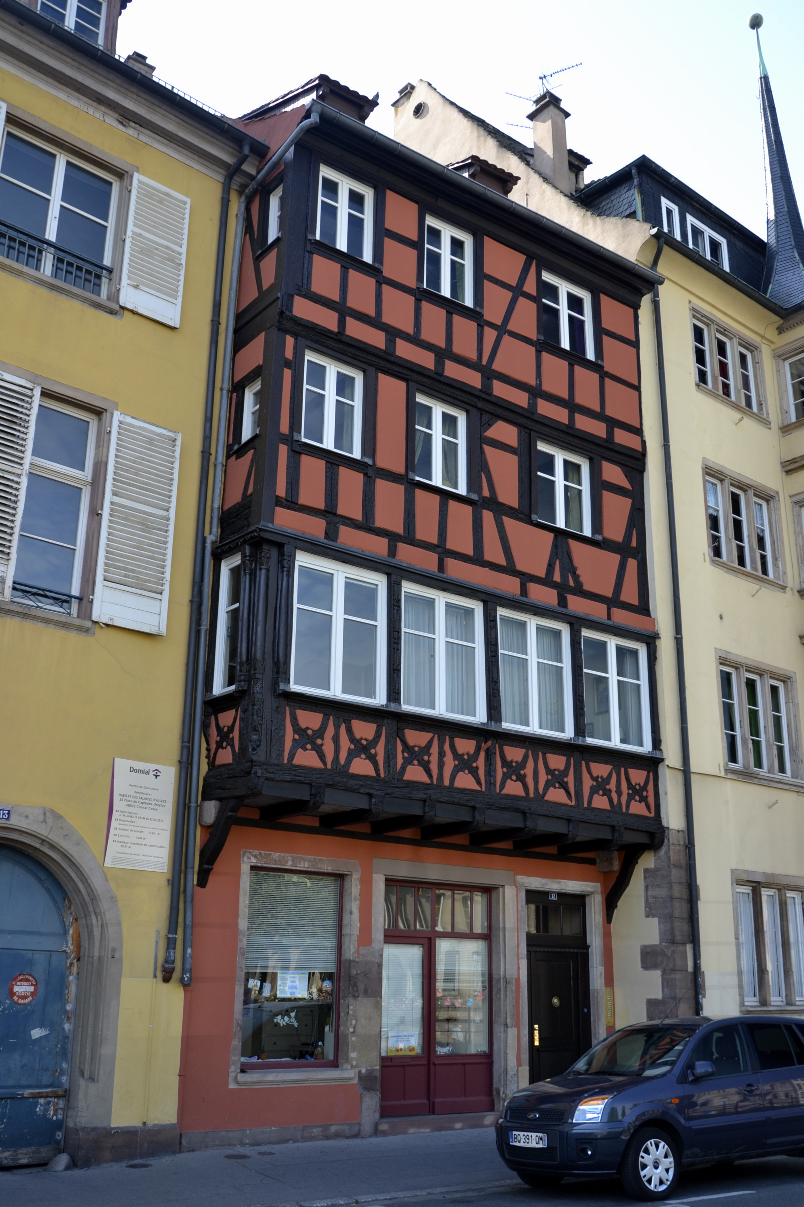 Caractéristiques Ville : Strasbourg (67000) Quartier : Krutenau Adresse: 12, quai des Bateliers Livraison : 1537 Fonction : Logements Données techniques Niveaux : R+4 Hauteur : ±15.00 m